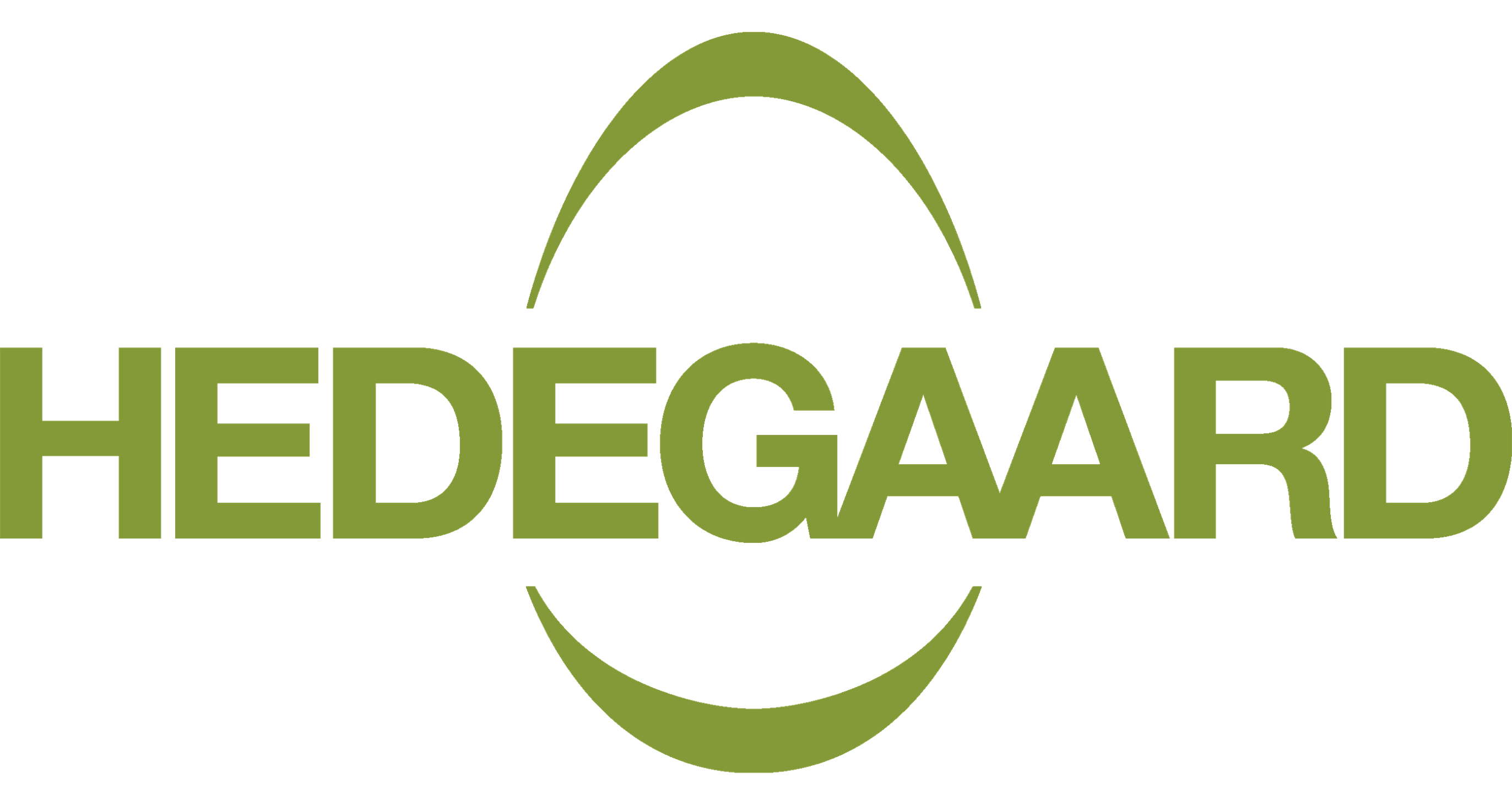 DAVA Foods's logo. DAVA Foods A/S er en dansk fremstillings- distributions- og pakkerivirksomhed. Virksomheden pakker og distribuerer skalæg, desuden produceres pasteuriserede og kogte æggeprodukter. DAVA Foods har sit hovedsæde i Hadsund. Tilladelse givet til brug på Wikipedia af Mette Due Andersen Projektchef i DAVA Foods. Scandinavian Design Lab, har designede logoet tilbage i 2006.